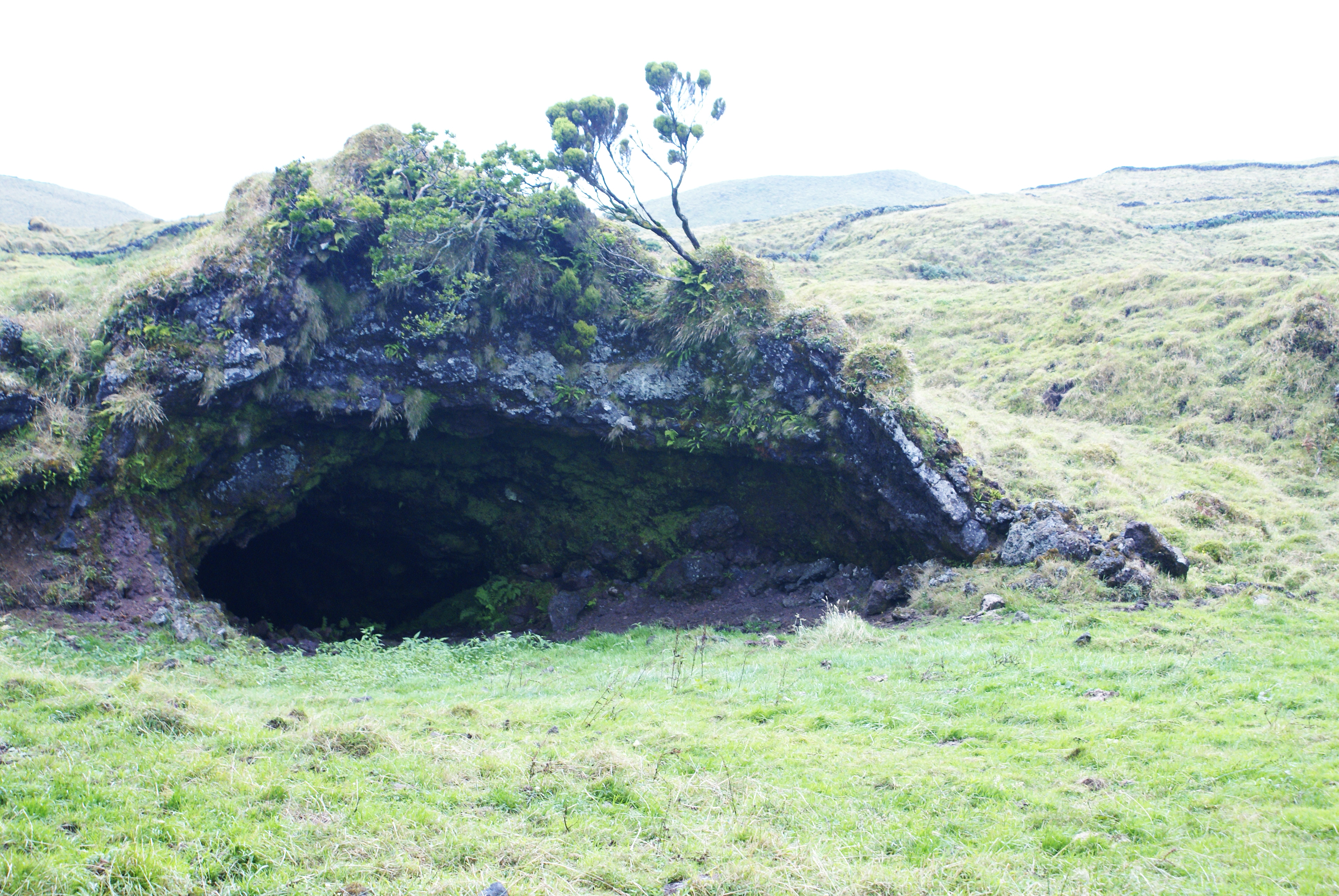 Interior montanhoso da ilha do Pico, Gruta, Açores, Portugal